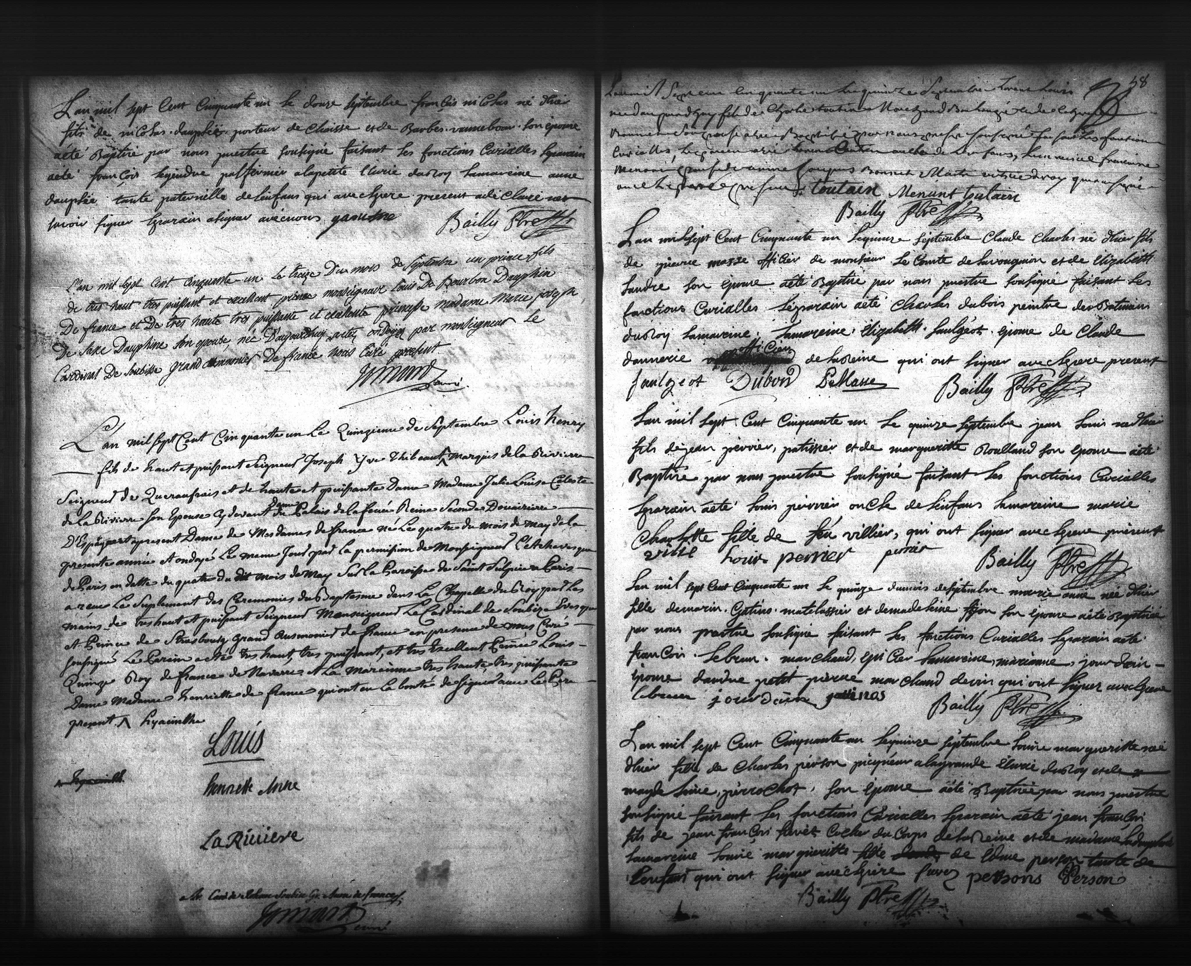 archives Yvelines